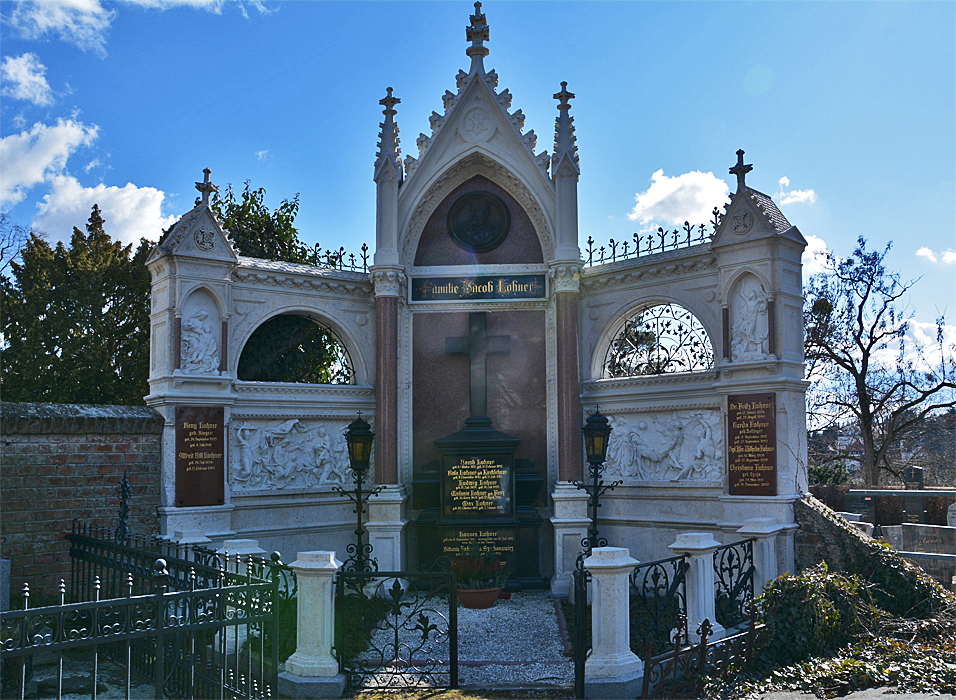 Grab der Industriellenfamilie Lohner auf dem Pötzleinsdorfer Friedhof, Wien